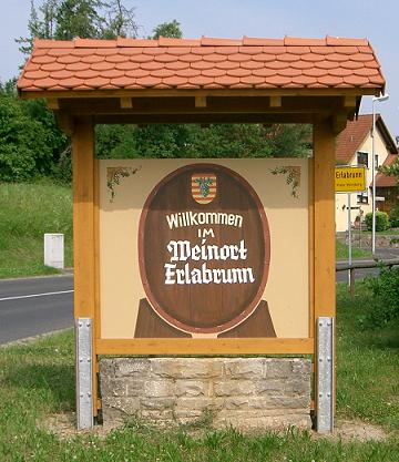 ortseingang von erlabrunn